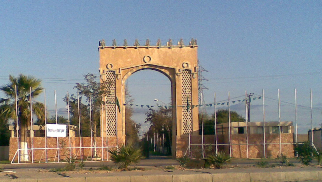 مدخل غابة جوددائم